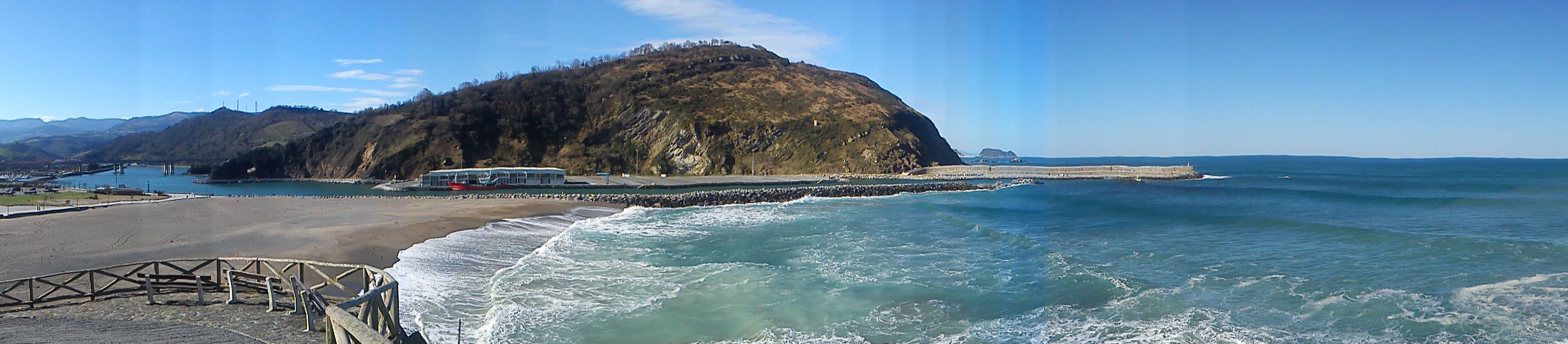 Desembocadura del Oria